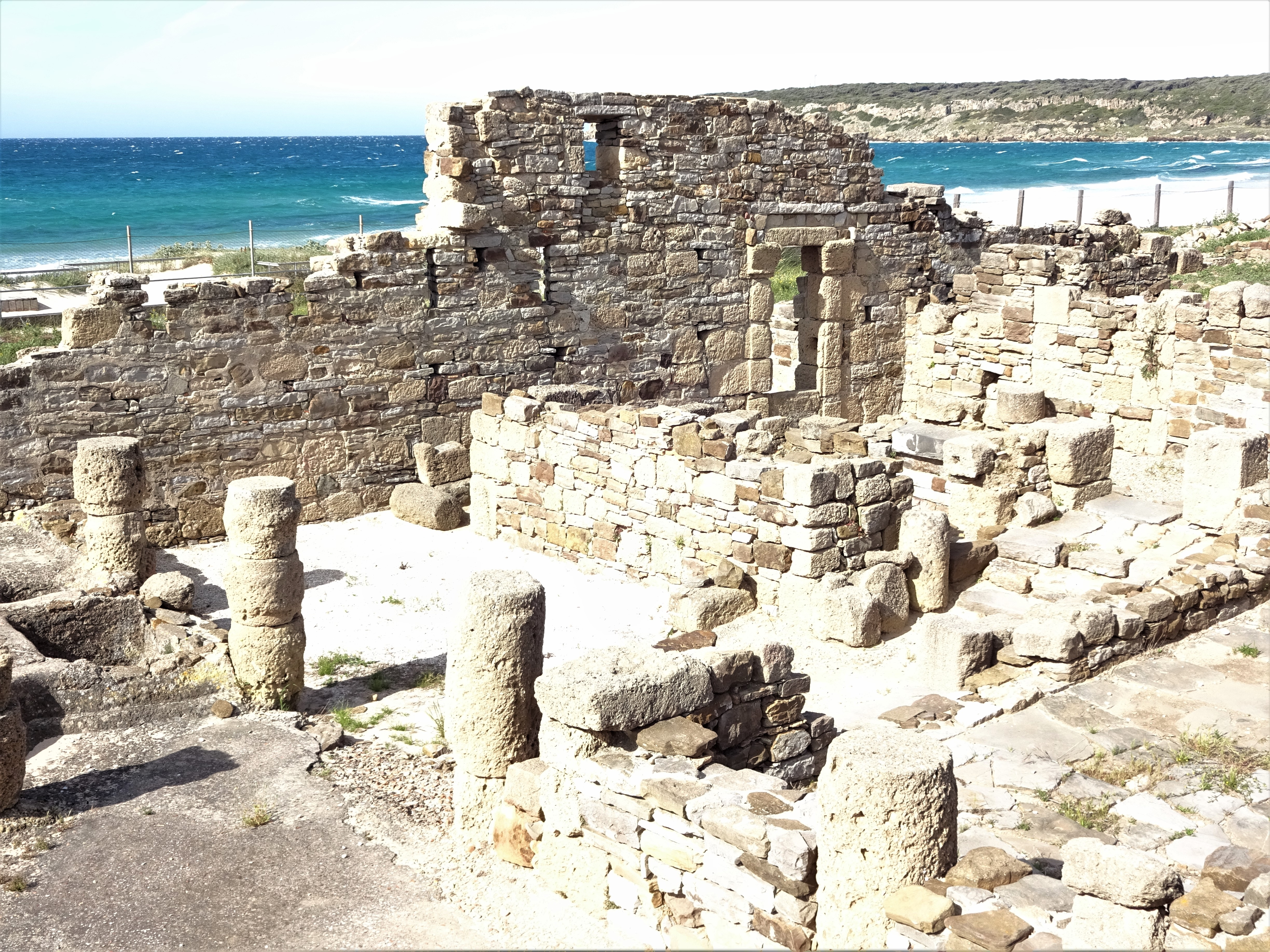 Hafentor neben Fischfabrik in Baelo Claudia